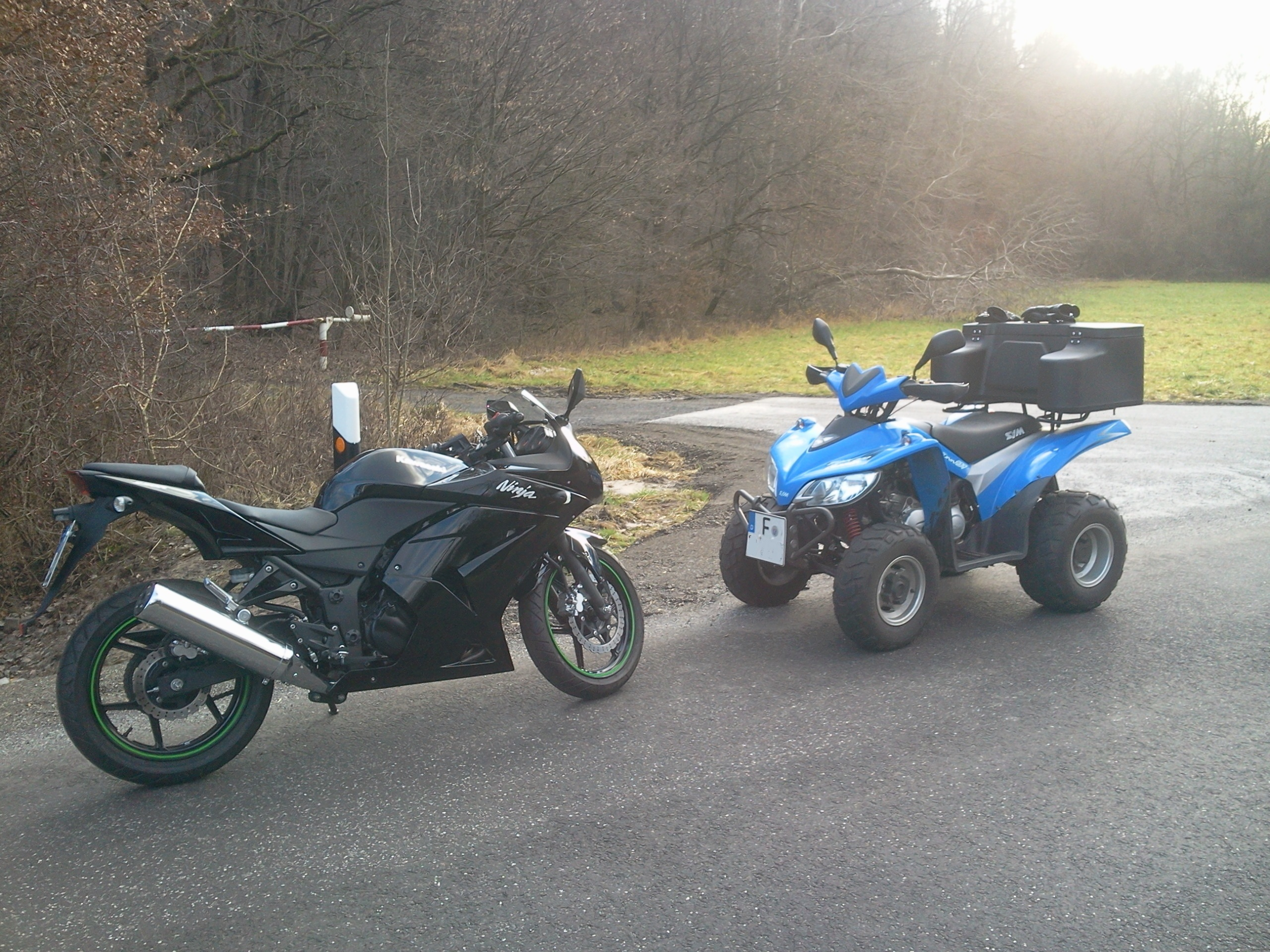 Eine SYM TrackRunner 200 während einer Tour neben einer Kawasaki Ninja 250R